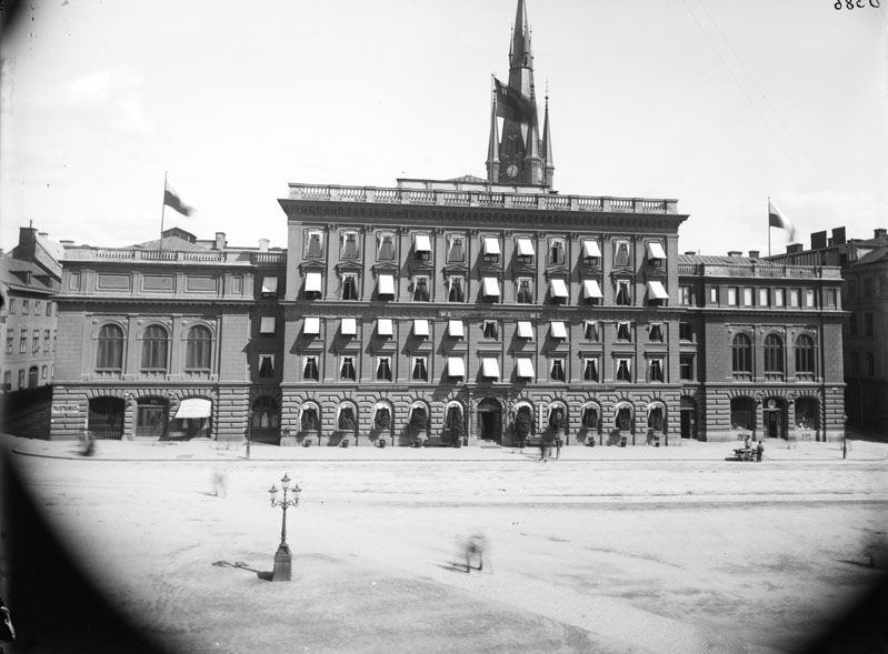 Hotel W &